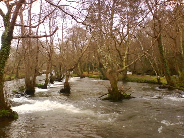 río Anllóns, Verdes, Coristanco, Coristanco, Galiza'409242248_259db36a51_o.jpg'